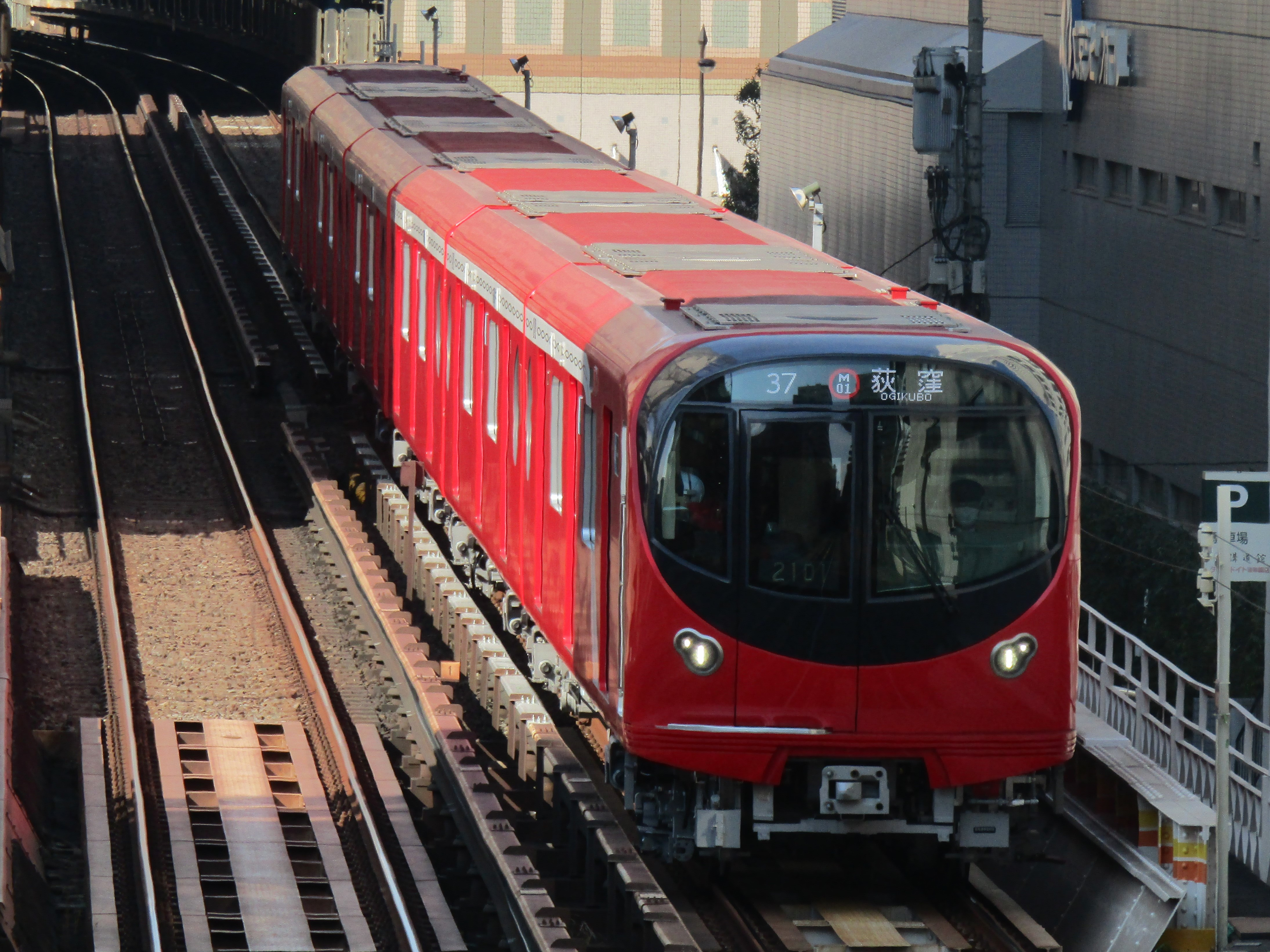 東京メトロ2000系電車営業開始日